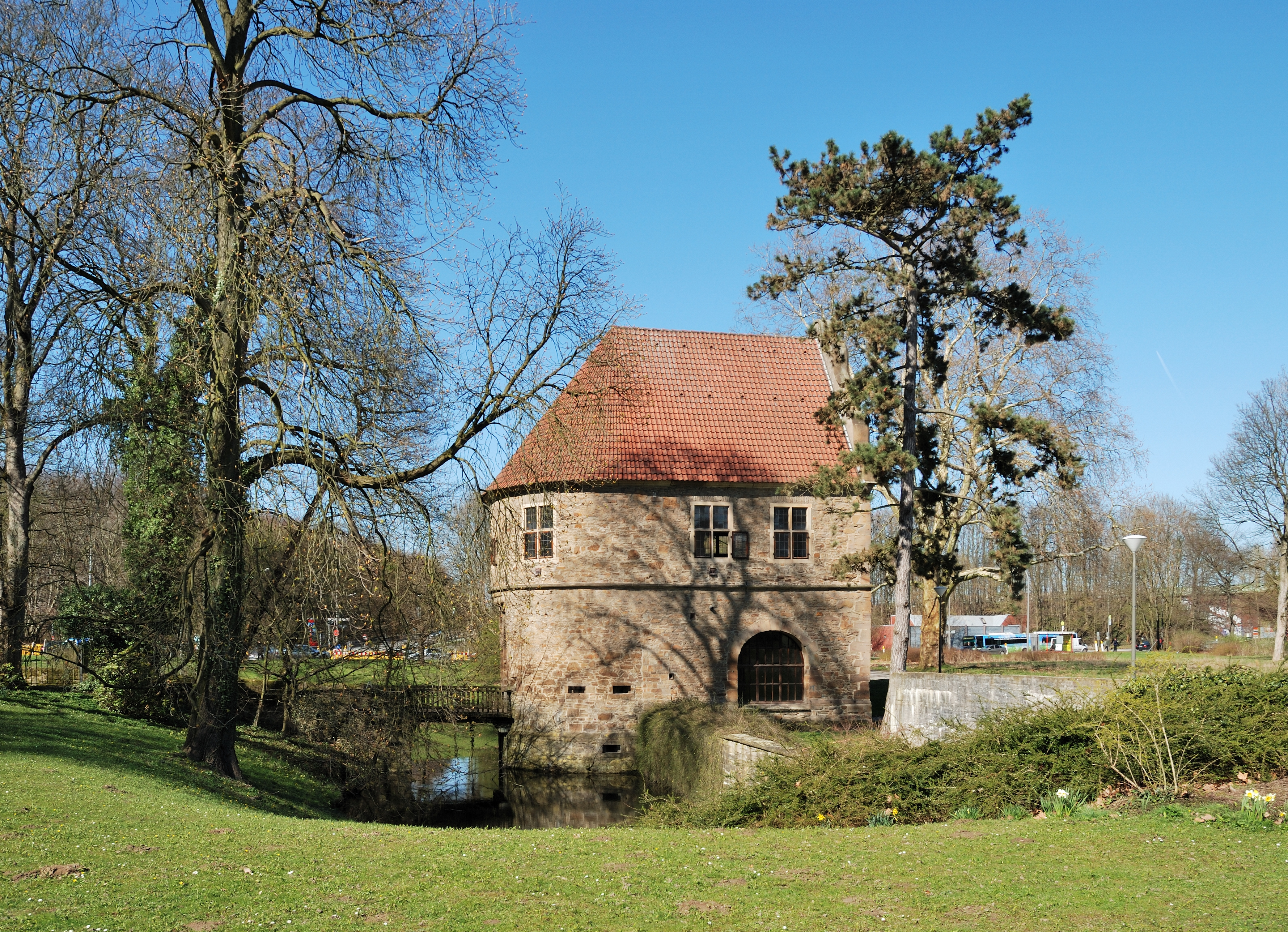 Dortmund, Rombergpark, Torhaus, Südfassade